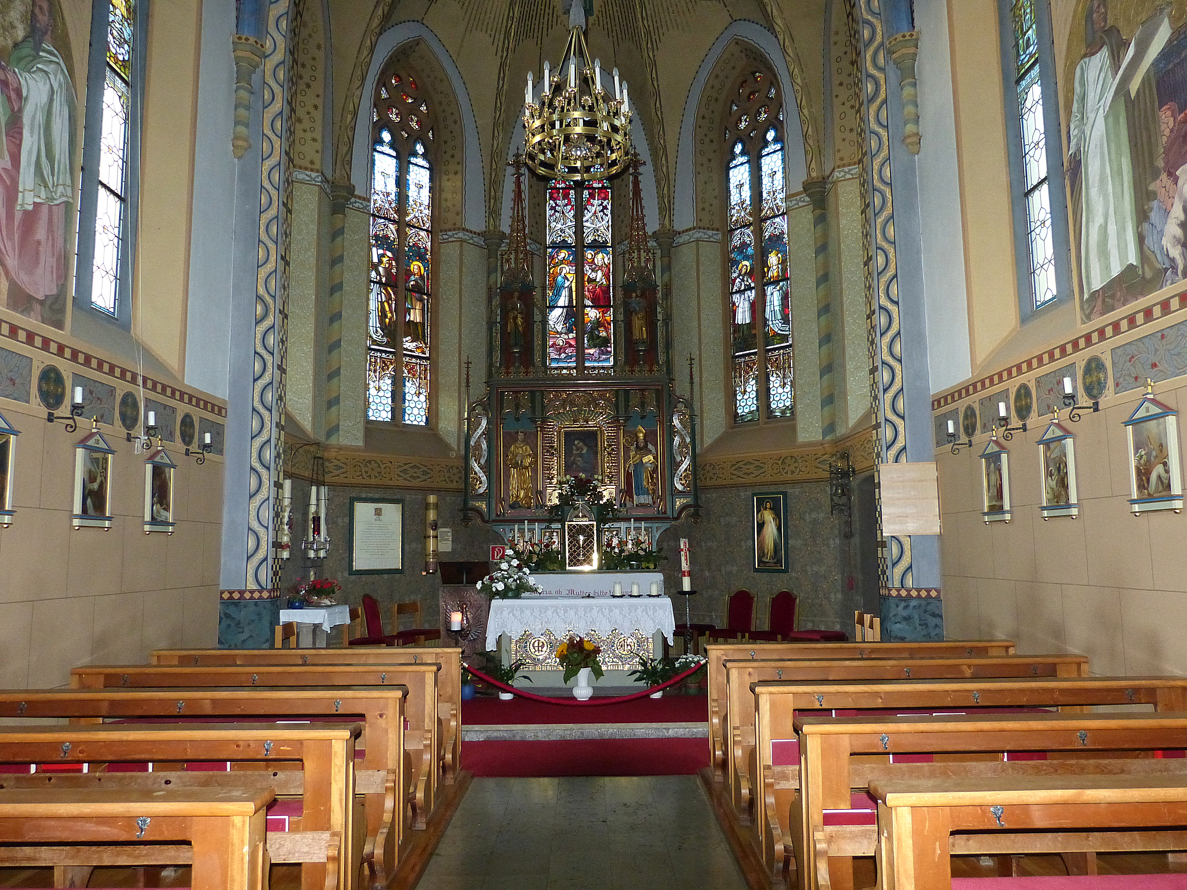 Wallfahrtskirche Maria Hilf am Locherboden, Mötz, Tirol